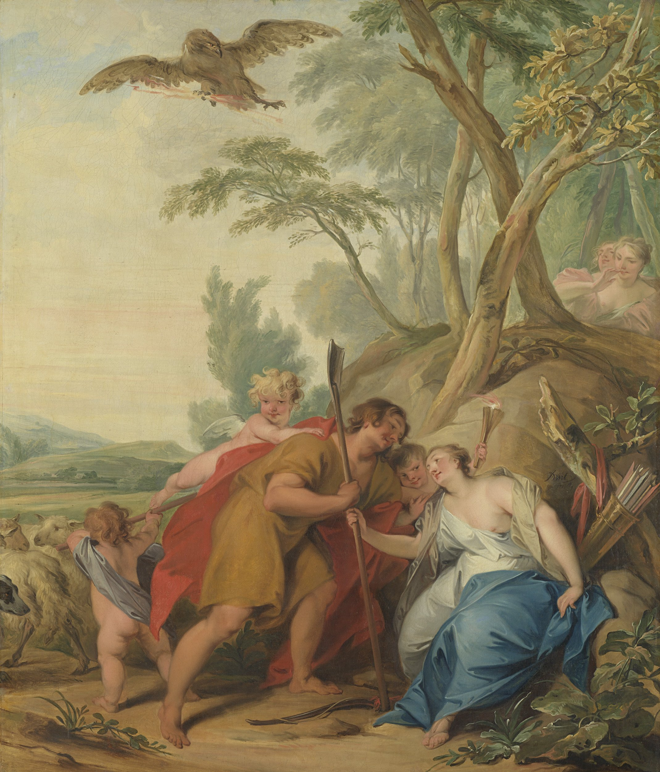 Jupiter en Mnemosyne. In een landschap maakt Jupiter, vermomd als een herder, Mnemosyne het hof. Zijn attribuut, een adelaar, vliegt boven het tafereel. Links putti met de kudde schapen. Behoort bij SK-A-3885. Onderdeel van een kamerdecoratie geschilderd in opdracht van Jan Baptist de Surmont, heer van Vlooswijk, voor zijn huis te Loenen aan de Vecht.; Jacob de Wit (1695-1754), olieverf op doek, 1727